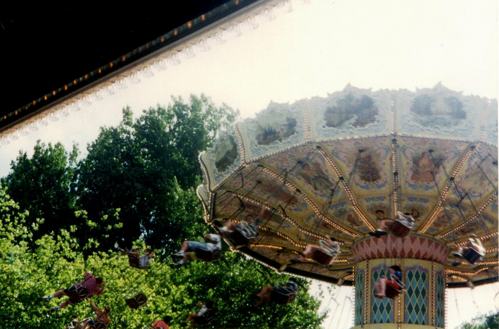 MeliparkValseViennoise